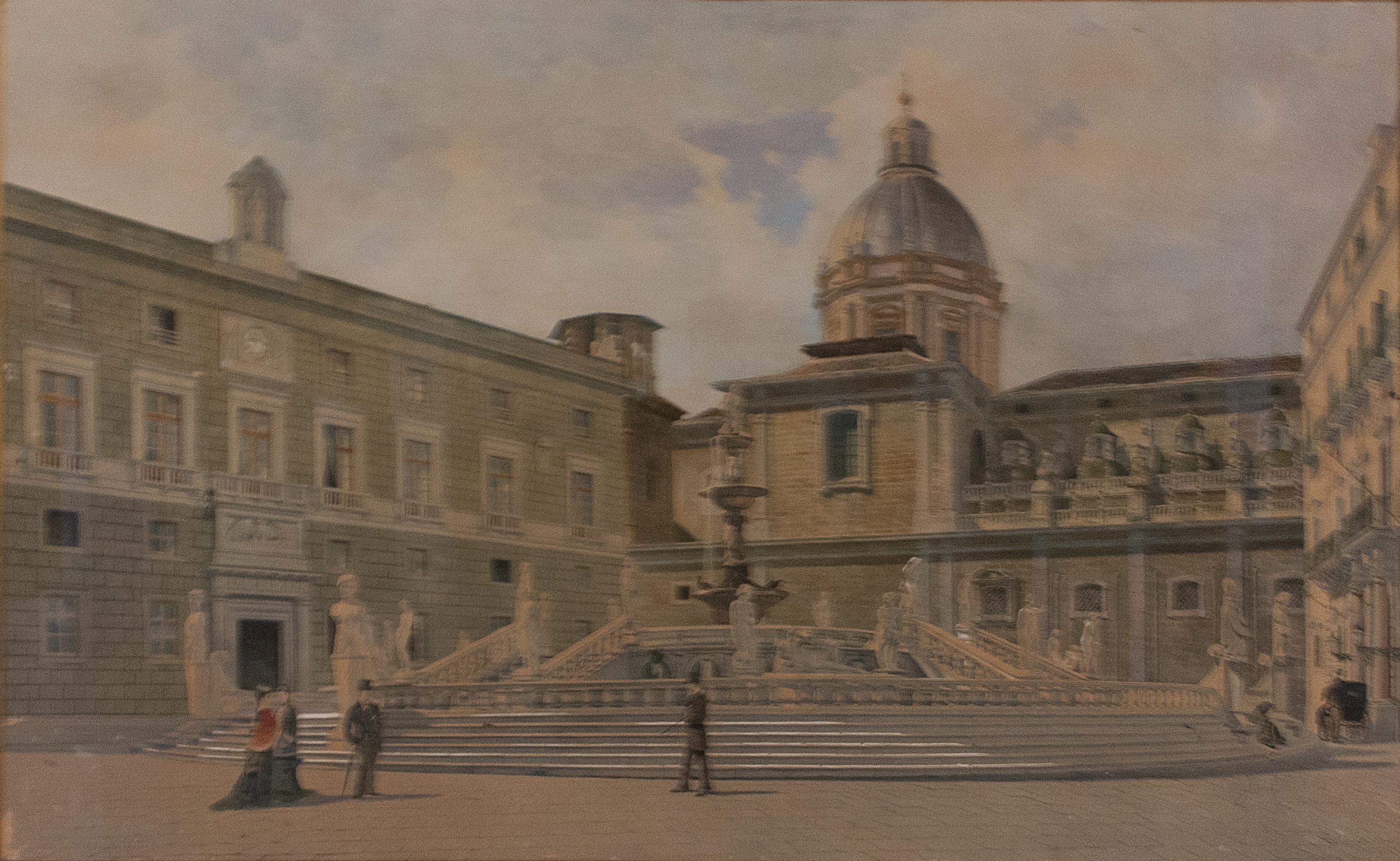 Piazza Pretoria - Rocco Lentini acquerello su carta 1878